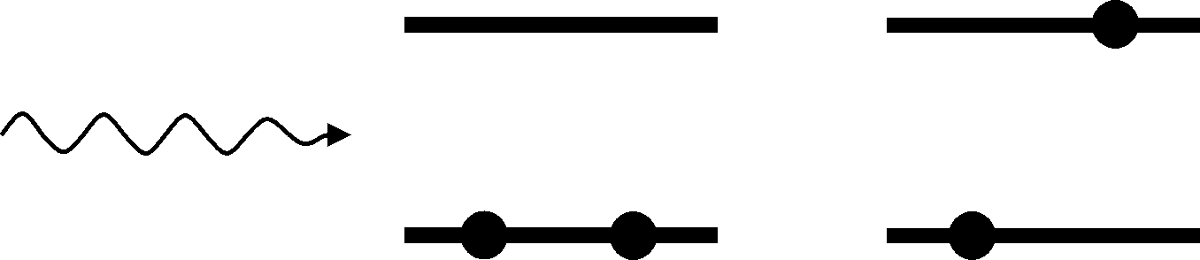 Shematski prikaz apsorpcije fotona na atomu. Lijeva strana slike pokazuje foton (zavinuta strjelica) i sustav prije apsorpcije. Elektroni (crni kružići) se nalaze u osnovnom energijskom stanju (horizontalne crte). Desna strana slike pokazuje sustav poslije apsorpcije: elektron se nalazi pobuđenom energijskom stanju.